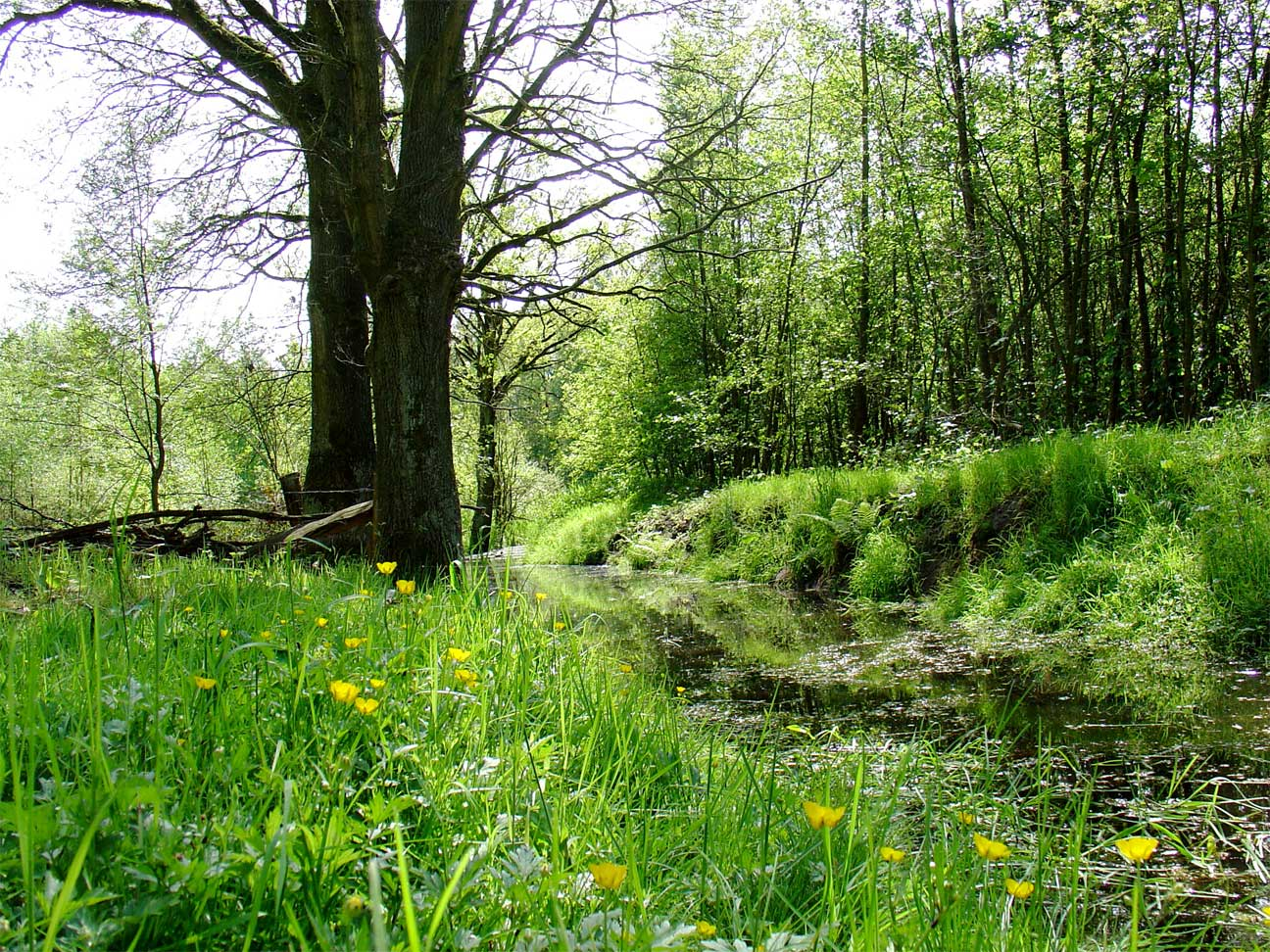 Het Aamsveen natuurgebied ten oosten van Enschede aan de Duitse grens